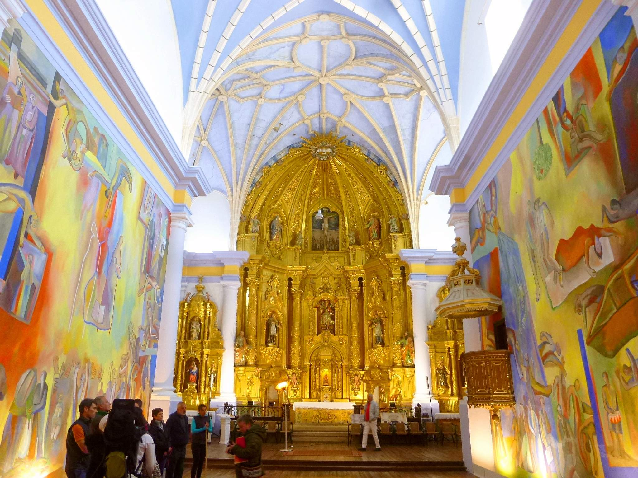 'Pinturas para la vida', proyecto artístico de decoración pictórica del interior y el pórtico de la iglesia de San Miguel Arcángel de Antezana de Foronda (Vitoria, Álava), iniciado por Xabier Egaña en 2013. El autor, discípulo del escultor Jorge Oteiza, desarrolla una profusa iconografía de múltiple inspiración y temática, tanto religiosa como profana, con un estilo figurativo y cromático que recuerda las obras de Marc Chagall y Pablo Picasso.